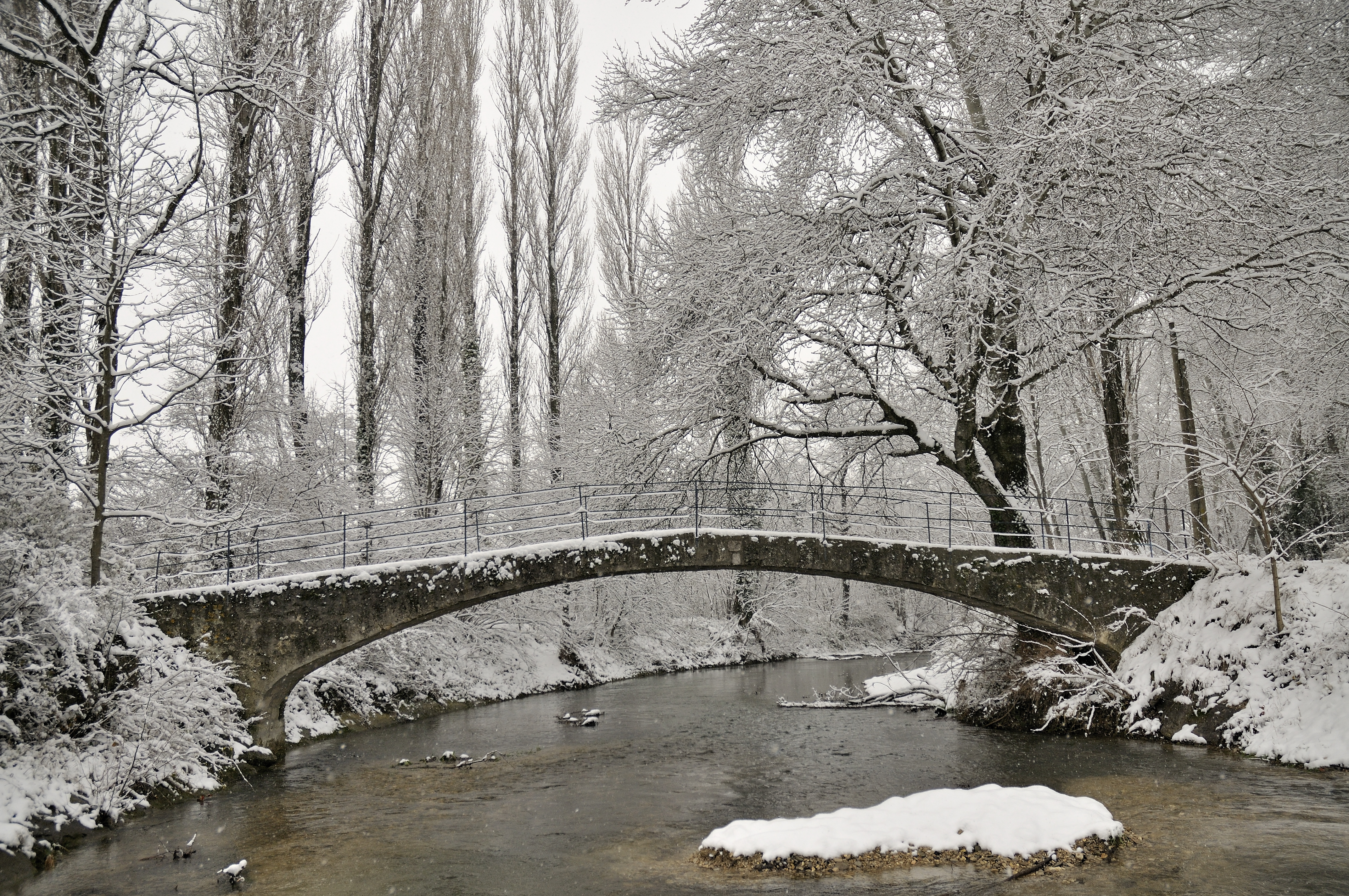 pont sur la véore XVIIe siécle